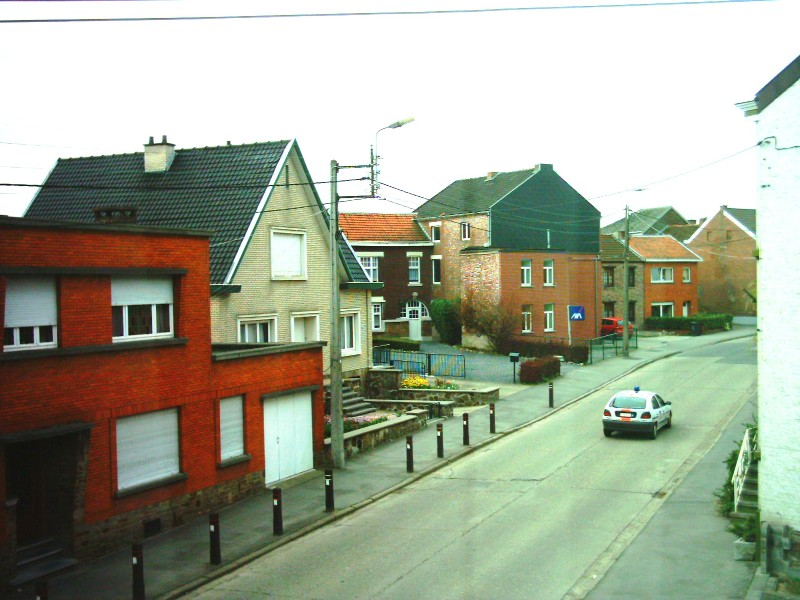 Ricerca personale